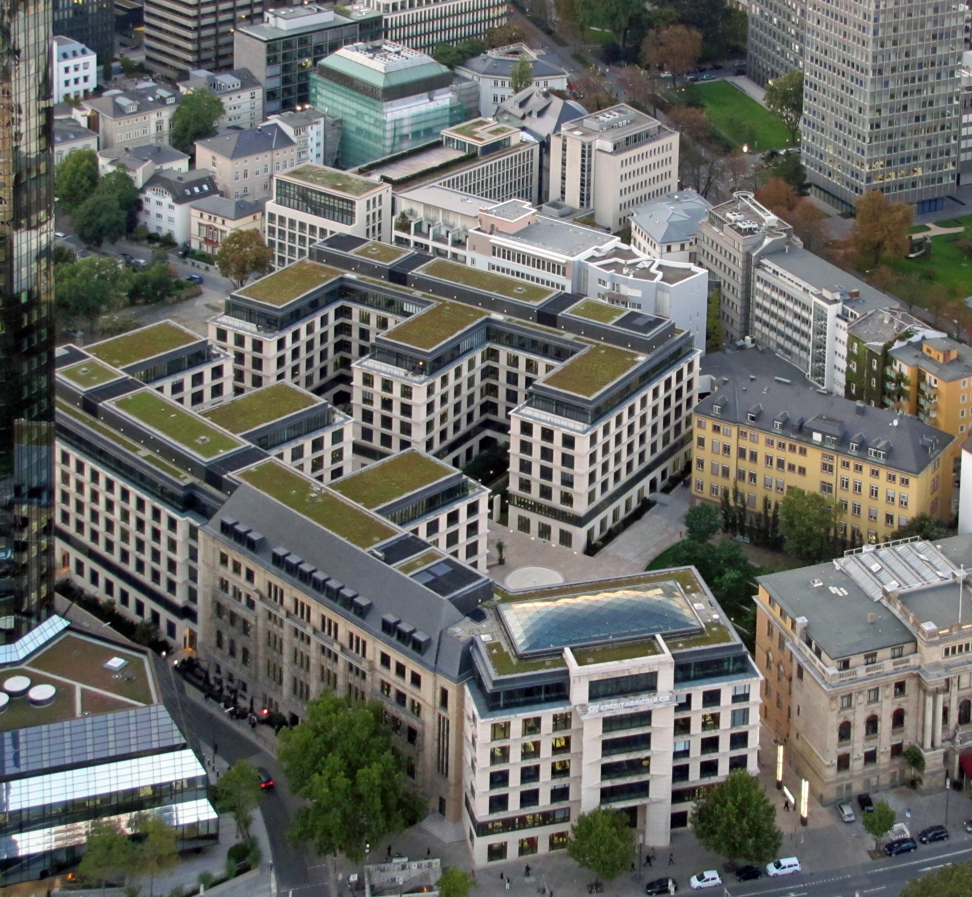 Credit Agricole Niederlassung in Ffm.